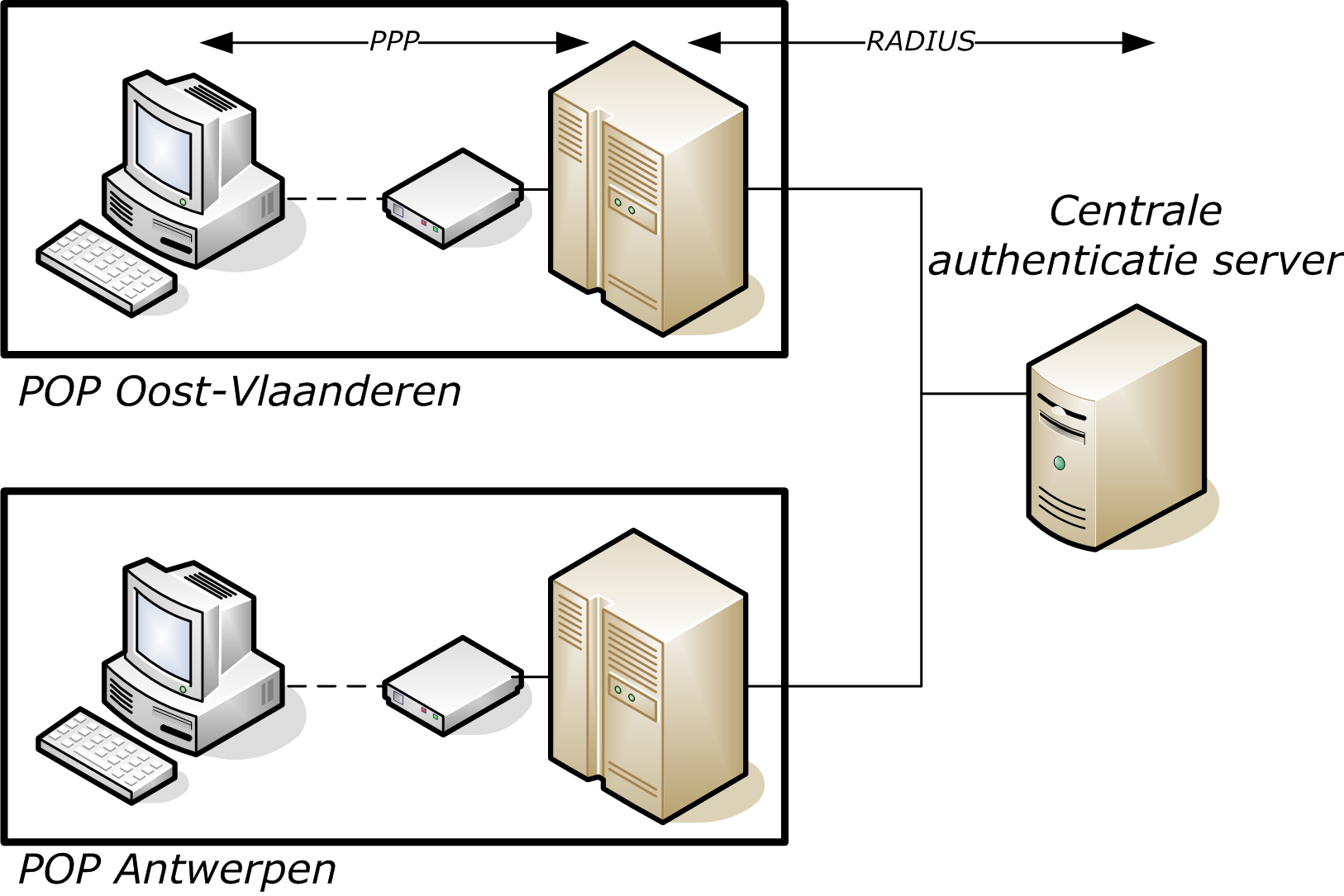 Inbellen bij POP.